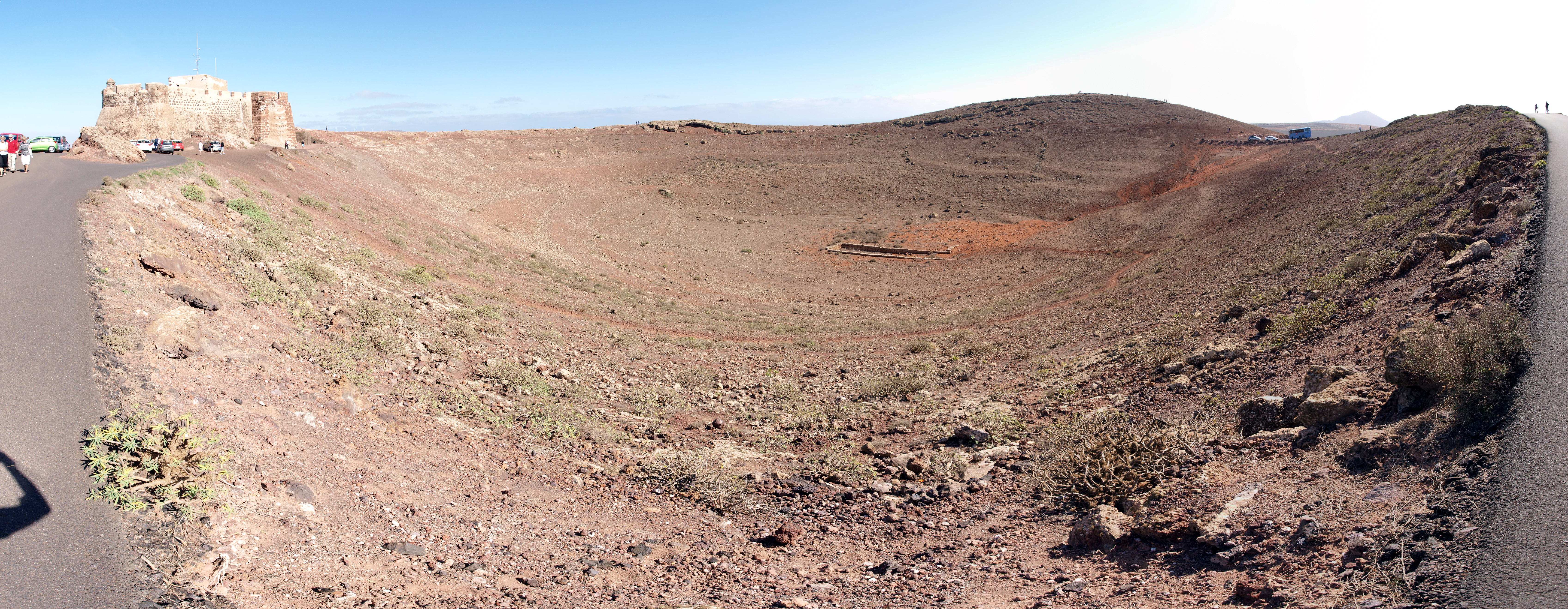 Der Krater des Vulkans Guanapay bei Teguise auf Lanzarote. Links am Kraterrand das Castillo de Santa Bárbara. 180° Panaroma, erstellt aus 16 Einzelaufnahmen mit Hilfe von Hugin